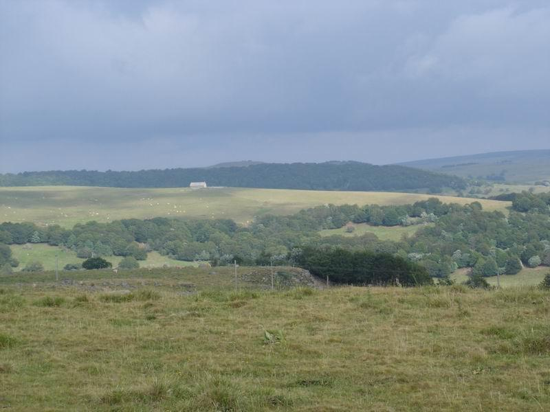 Aubrac source lecybersurfeur